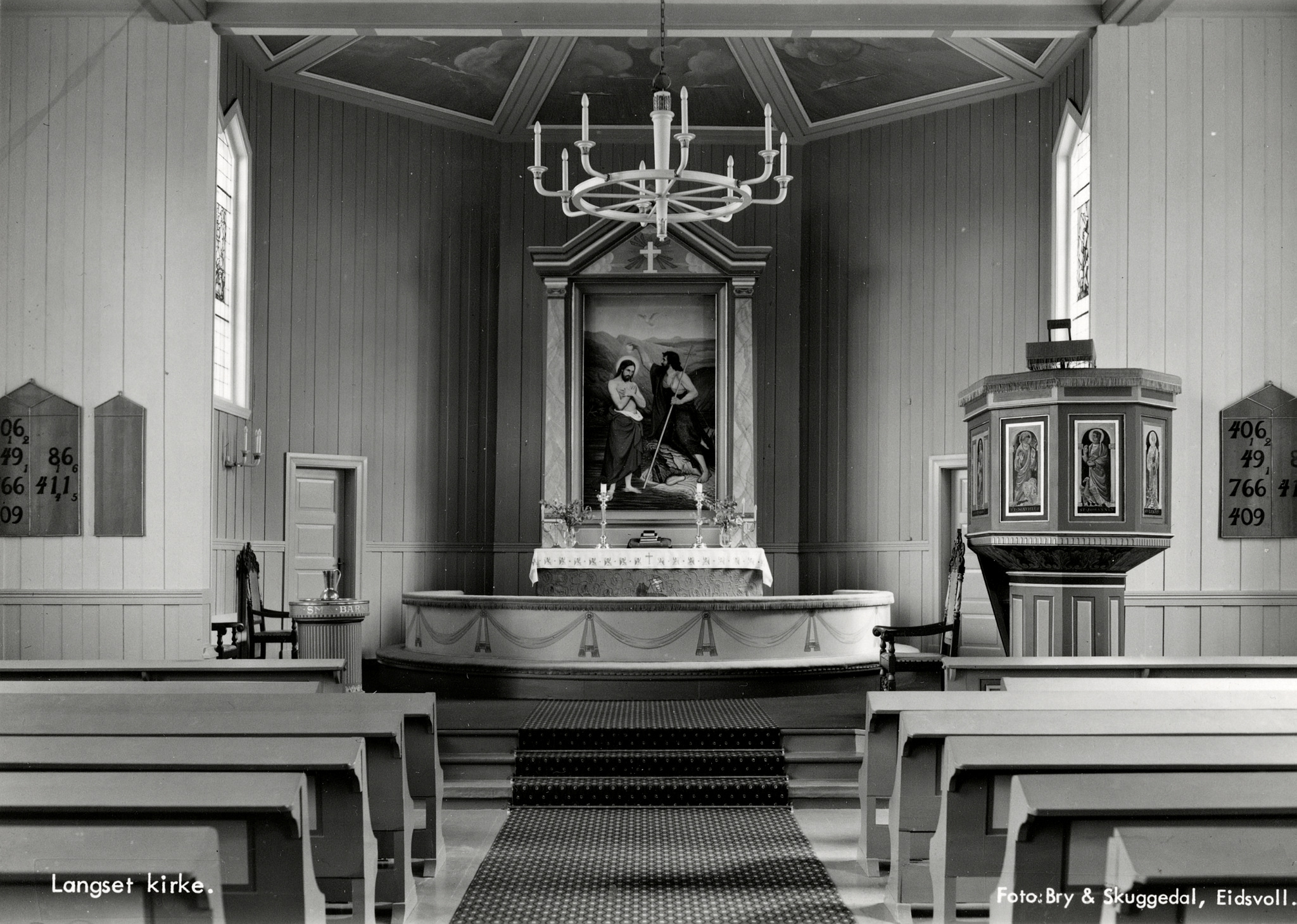 Interiør i Langset kirke. Alterbilde malt av A.O. Indseth i kopi etter Adolph Tidemand. Foto: Bry & Skuggedal, fra Kulturminnebilder.no.